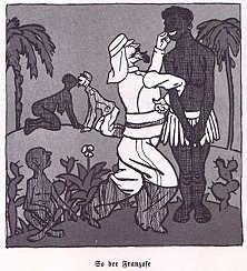 Vergleich der Kolonialmächte: So kolonisiert der Deutsche... der Engländer... so der Franzose... und so der Belgier, In: Simplicissimus Luxusausgabe Spezial-Nummer Kolonien 1904, Karikatur von Theodor Heine